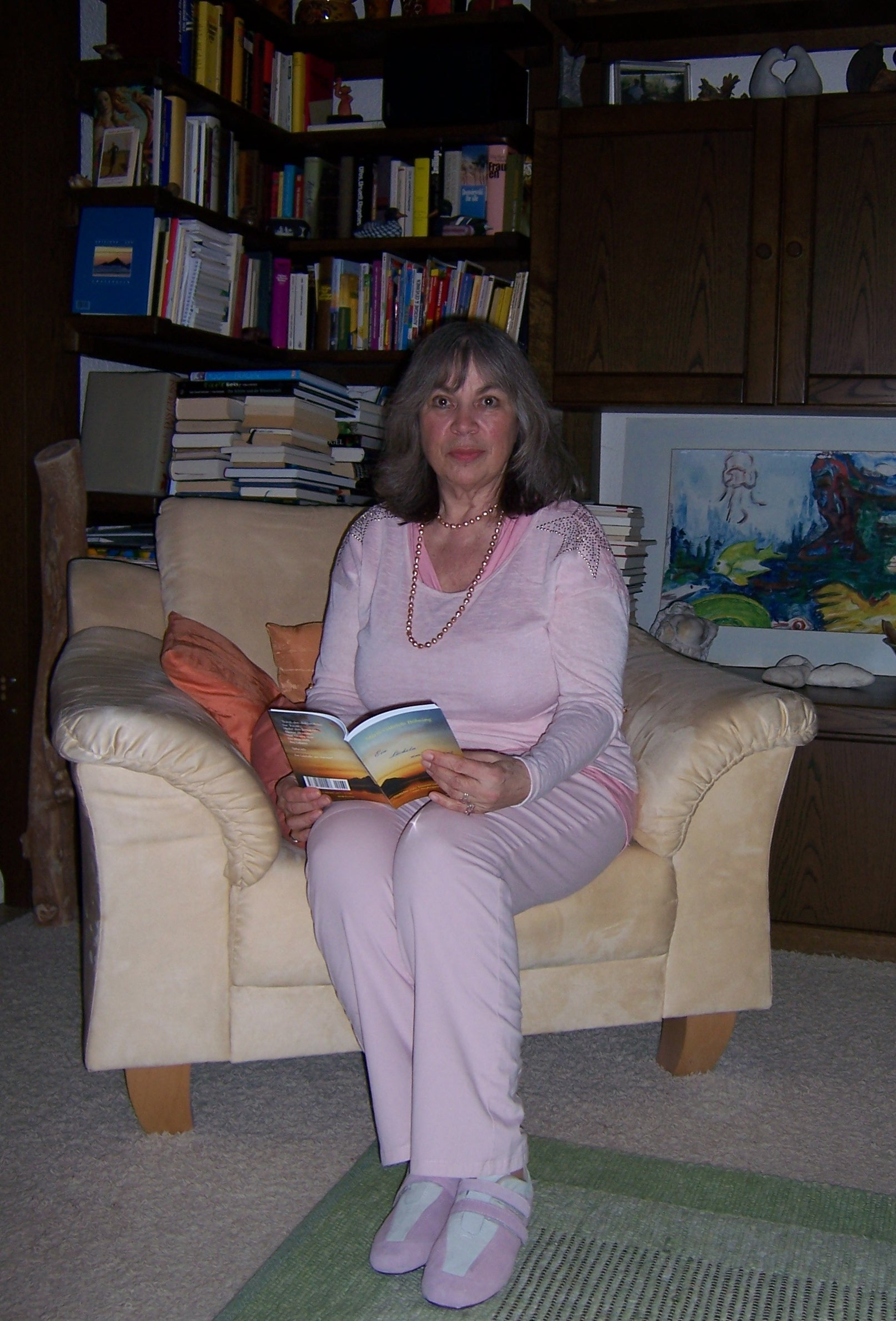 Die Schriftstellerin Gabriele Böhning liest aus Ein Lächeln am Horizont (2015)